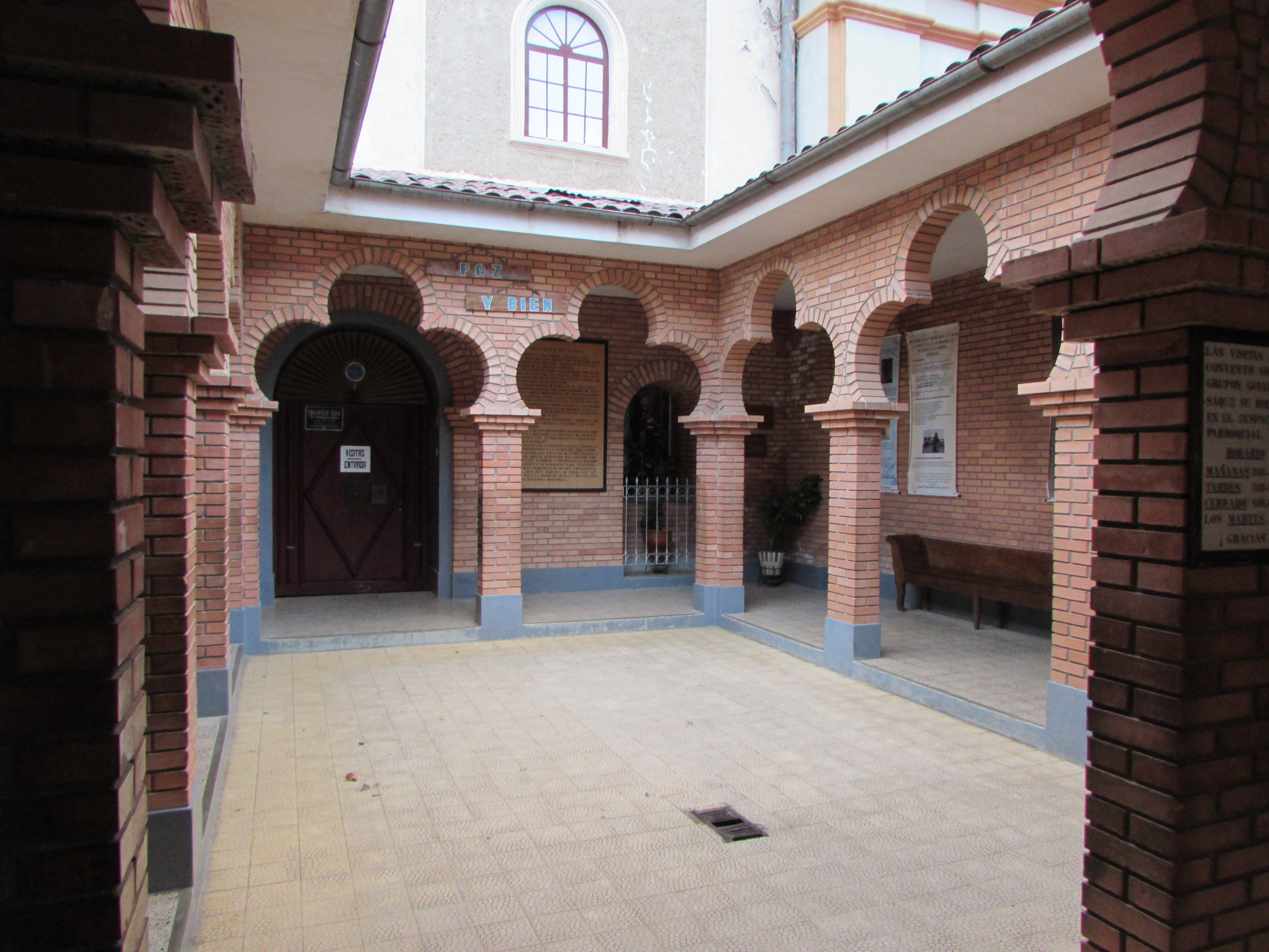 Convento de Santa Rosa de Ocopa